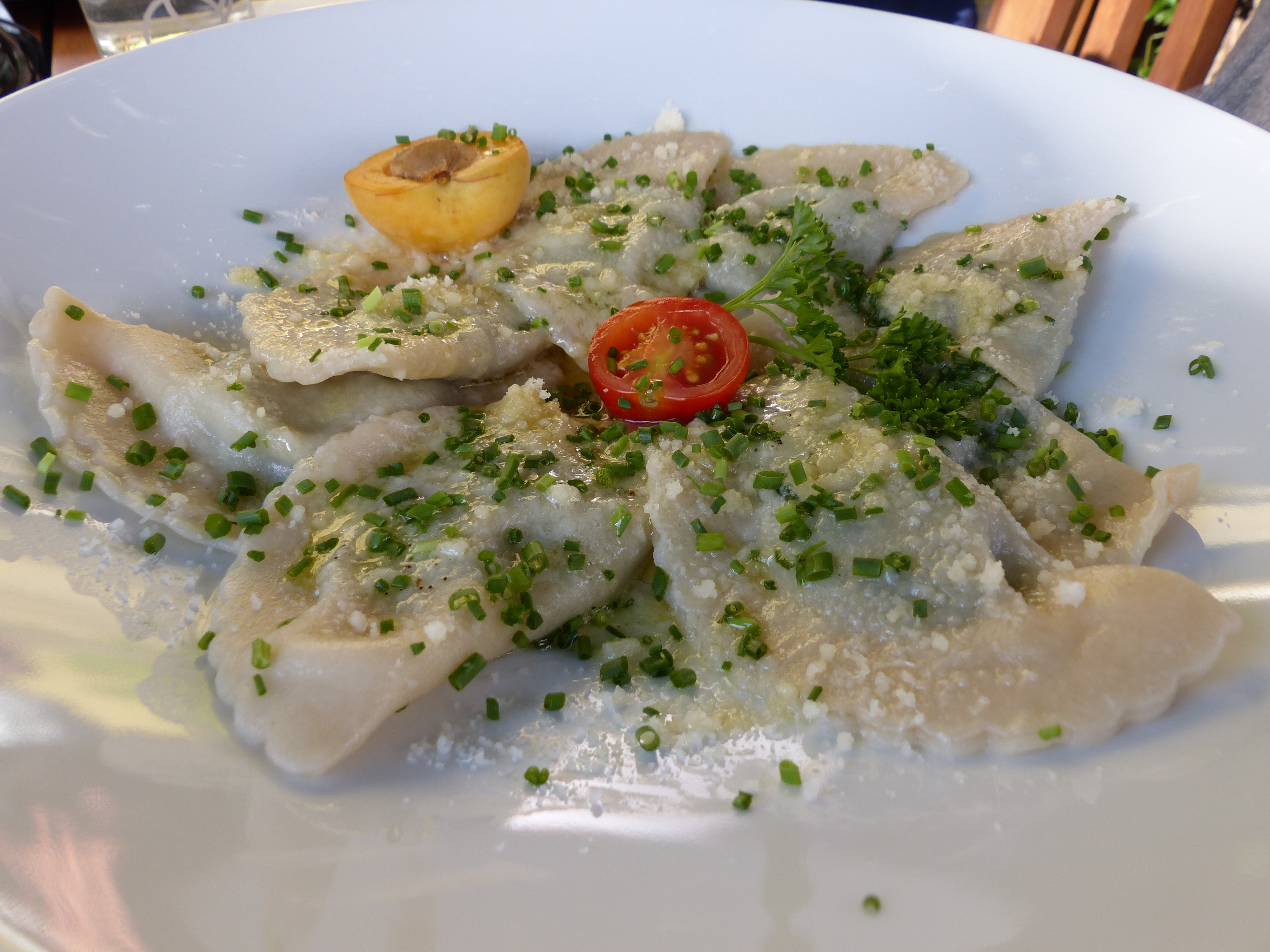 Schlutzkrapfen (Gasthaus zur Krone, Laas)